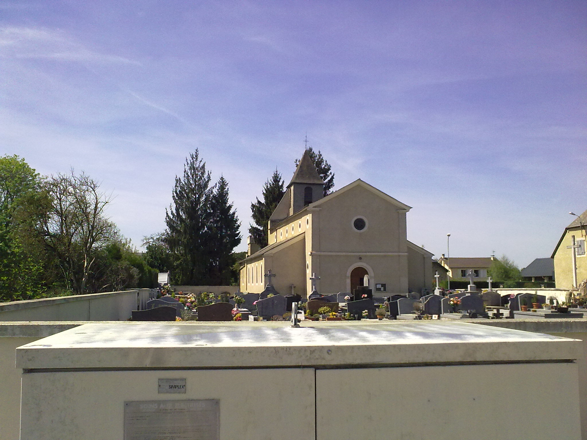 Artigueloutan, France